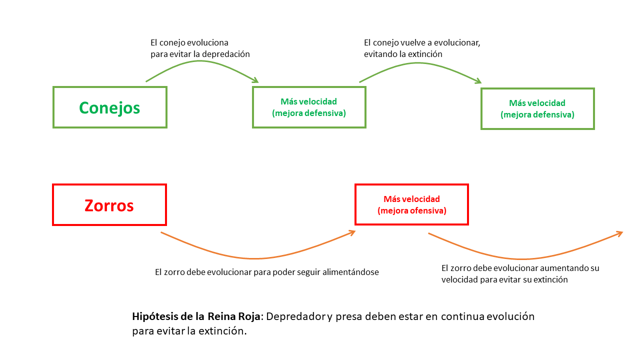 Se observa una relación depredador-presa entre conejos y zorros, en la cual debe existir una evolución continuada de ambas especies para evitar la extinción siguiendo el principio de la hipótesis de la Reina Roja. El conejo evoluciona aumentando su velocidad para escapar del ataque del zorro, y el zorro evoluciona aumentando su velocidad para alcanzar al conejo. Esta evolución es constante, en caso de que uno de los dos deje de evolucionar, se producirá su extinción.